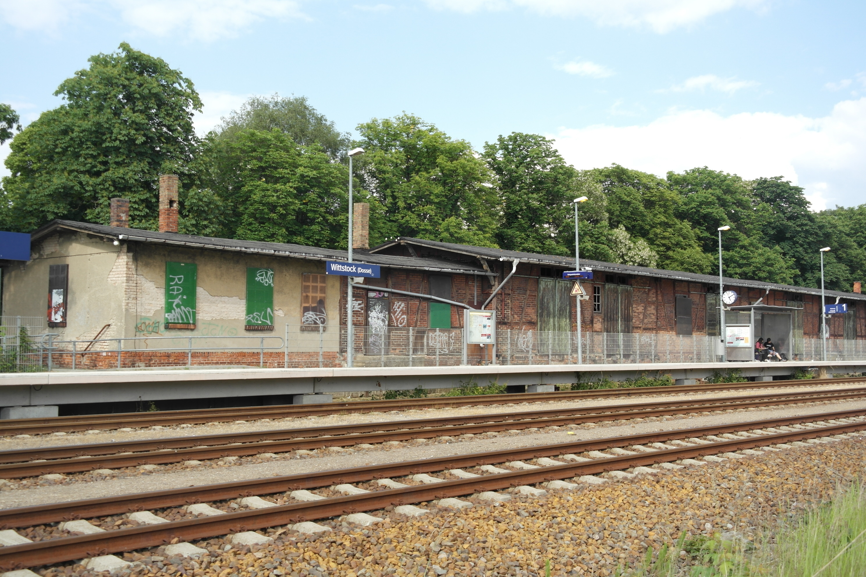 Bahnhof Wittstock, Baudenkmal, Güterschuppen